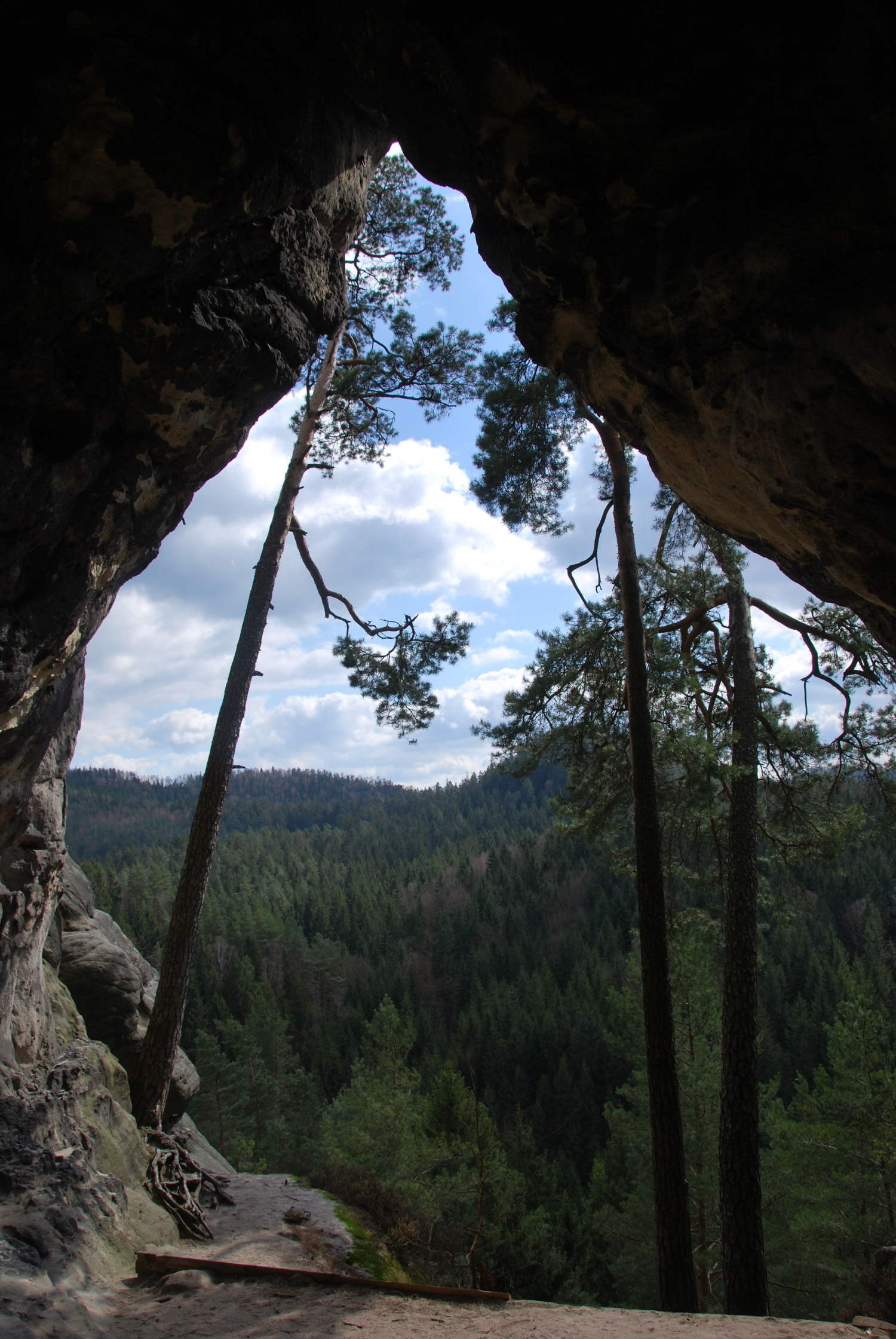 Kleinsteinhöhle – Blick über das Kirnitztal zum Großen Pohlshorn